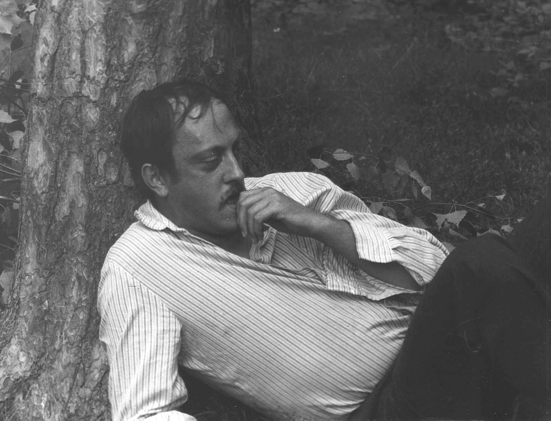 Janusz Sokołowski